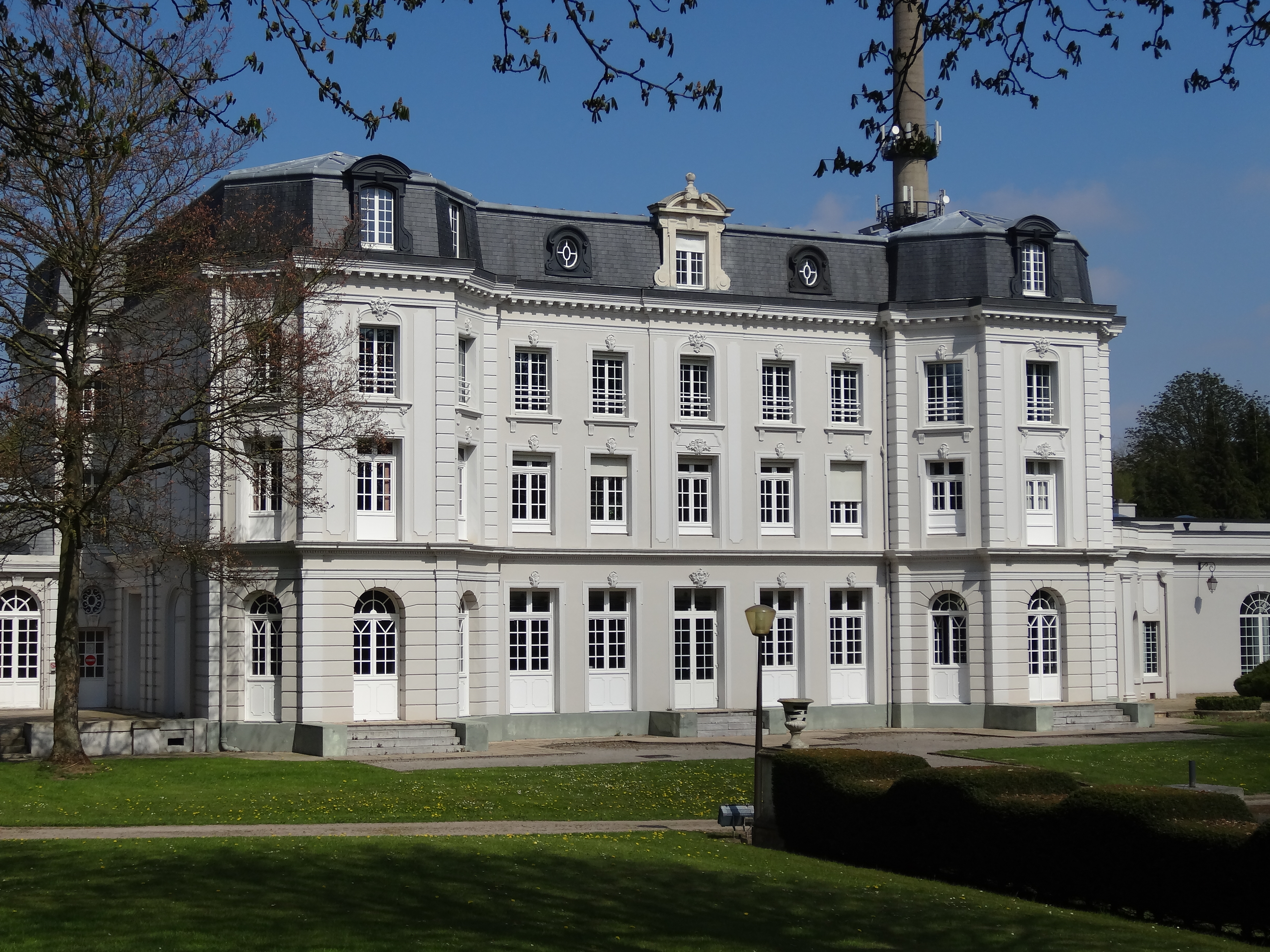 Le château Mercier était la résidence de l'ingénieur-directeur de la Compagnie des mines de Béthune dans le bassin minier du Nord-Pas-de-Calais, à Mazingarbe, Pas-de-Calais, Nord-Pas-de-Calais, France. Il est inscrit aux monuments historiques le 9 octobre 2009 et inscrit sur la liste du patrimoine mondial de l'Unesco le 30 juin 2012 et y constitue en partie le site no 81.